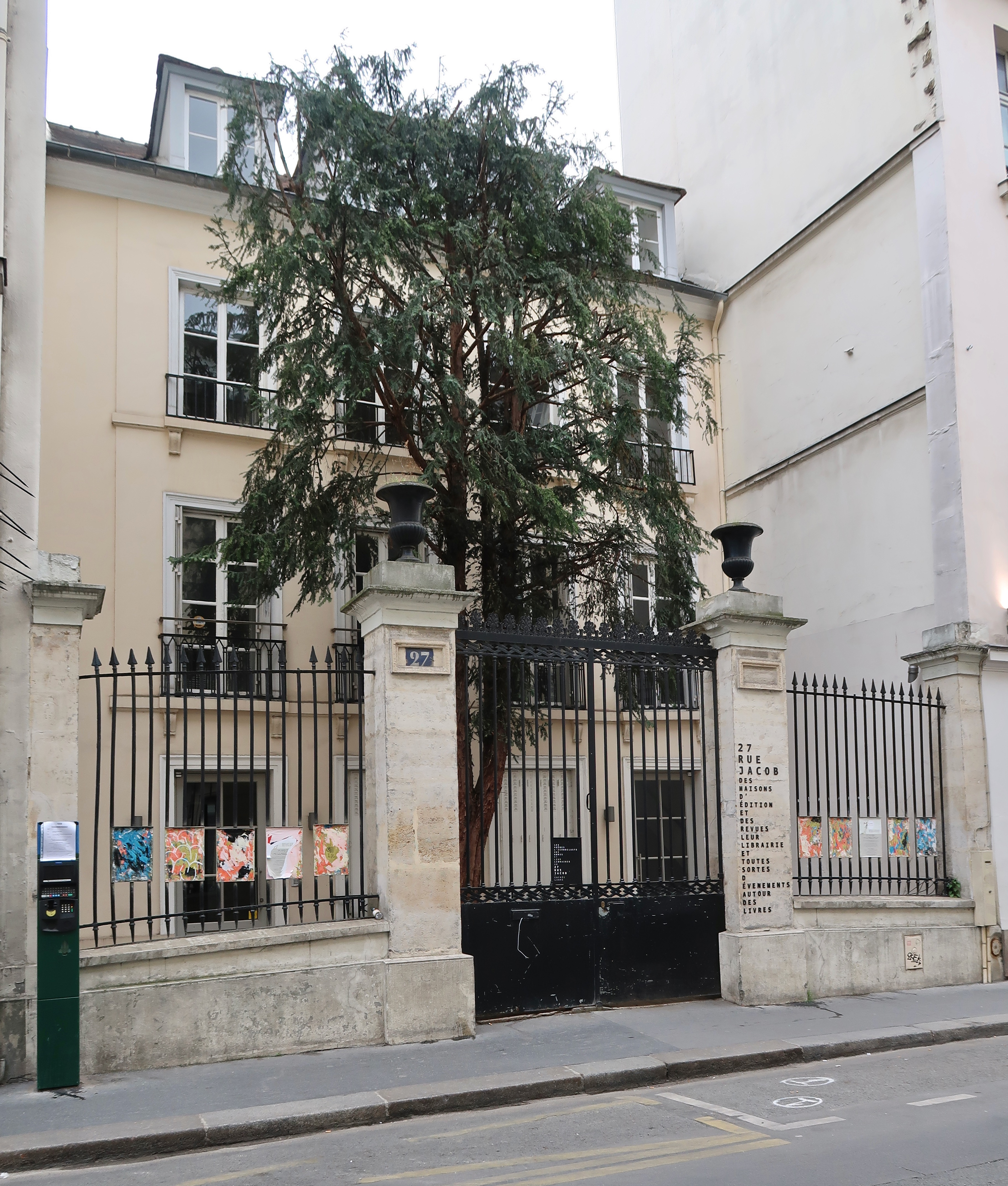 27 rue Jacob (Paris, 6e).